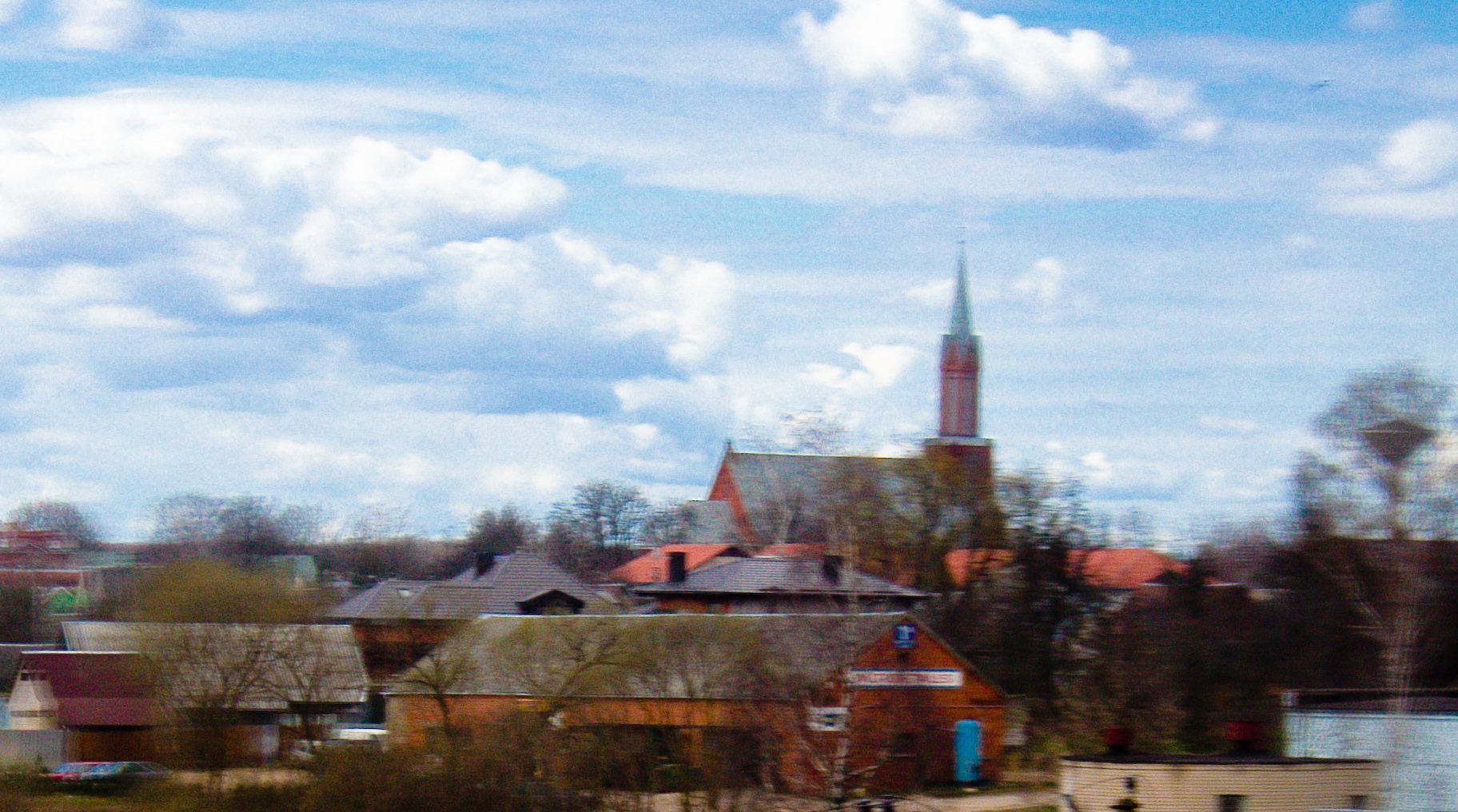 Kaišiadorys, Lithuania